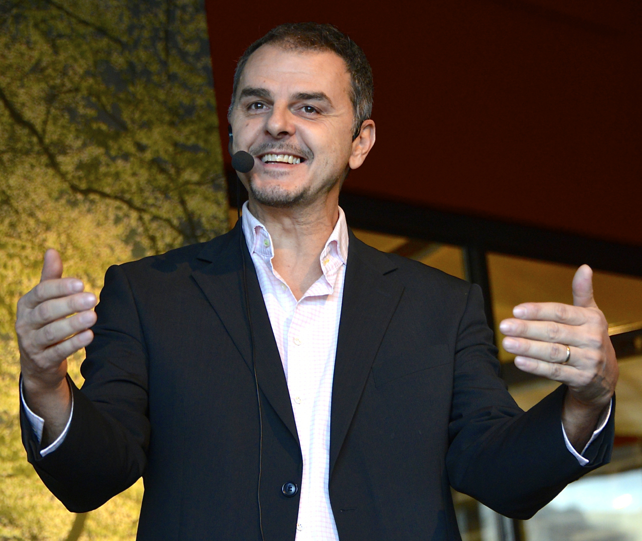 Jasenko Selimovic under debatten "Herbert Tingsten och kulturradikalismen nu och då" med Åsa Linderborg (Aftonbladet) och Björn Wiman (DN). Debatten ägde rum under öppet hus på Kulturhuset Stadsteatern i Stockholm i samband med 40-årsfirandet den 29 november 2014.